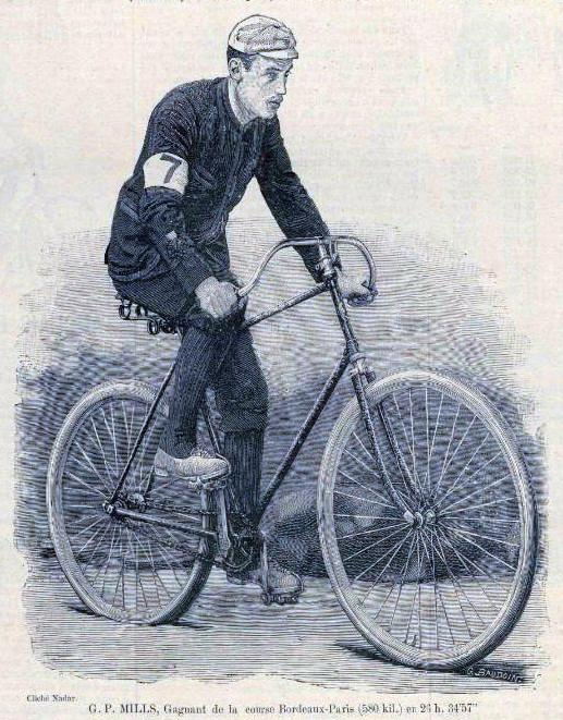 Georges Pilkington Mills, le premier vainqueur de la course Paris-Bordeaux en 1891.